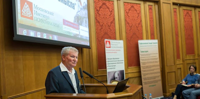 Moscow Conference on Man’s Search for Meaning with Dr. David Guttmann